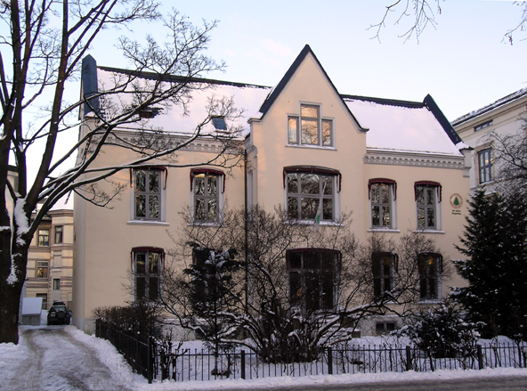 Wergelandsveien 23b, Oslo. Built 1865. Architect: Henrik Thrap-Meyer